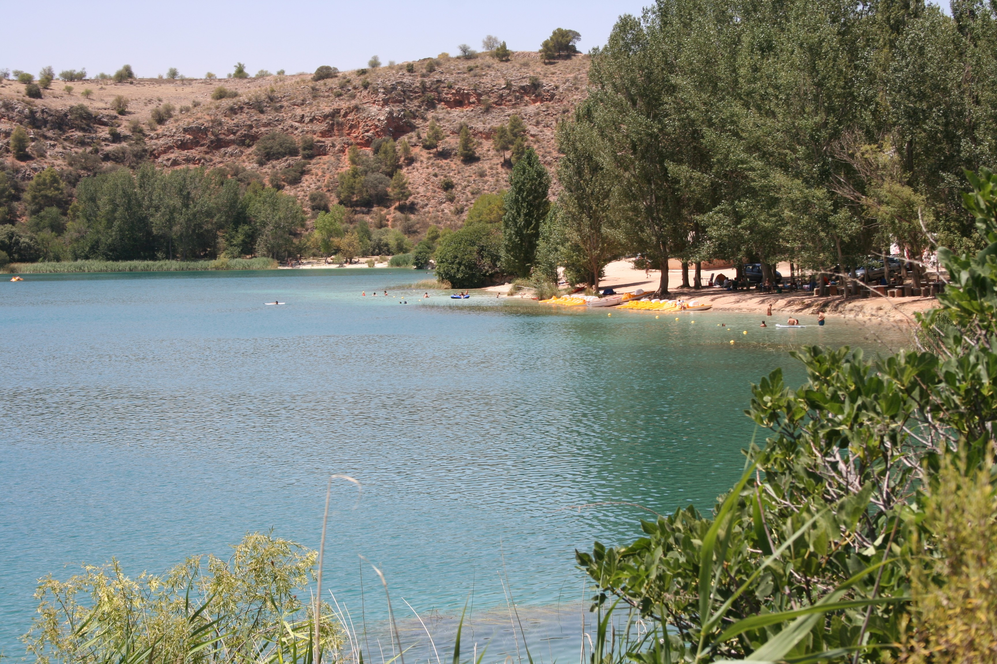 Playa de la laguna Santos Morcillo vista desde la barrera tobacea que la separa de la Salvadora